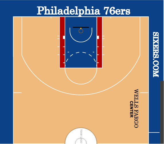 シクサーズホームコート配色